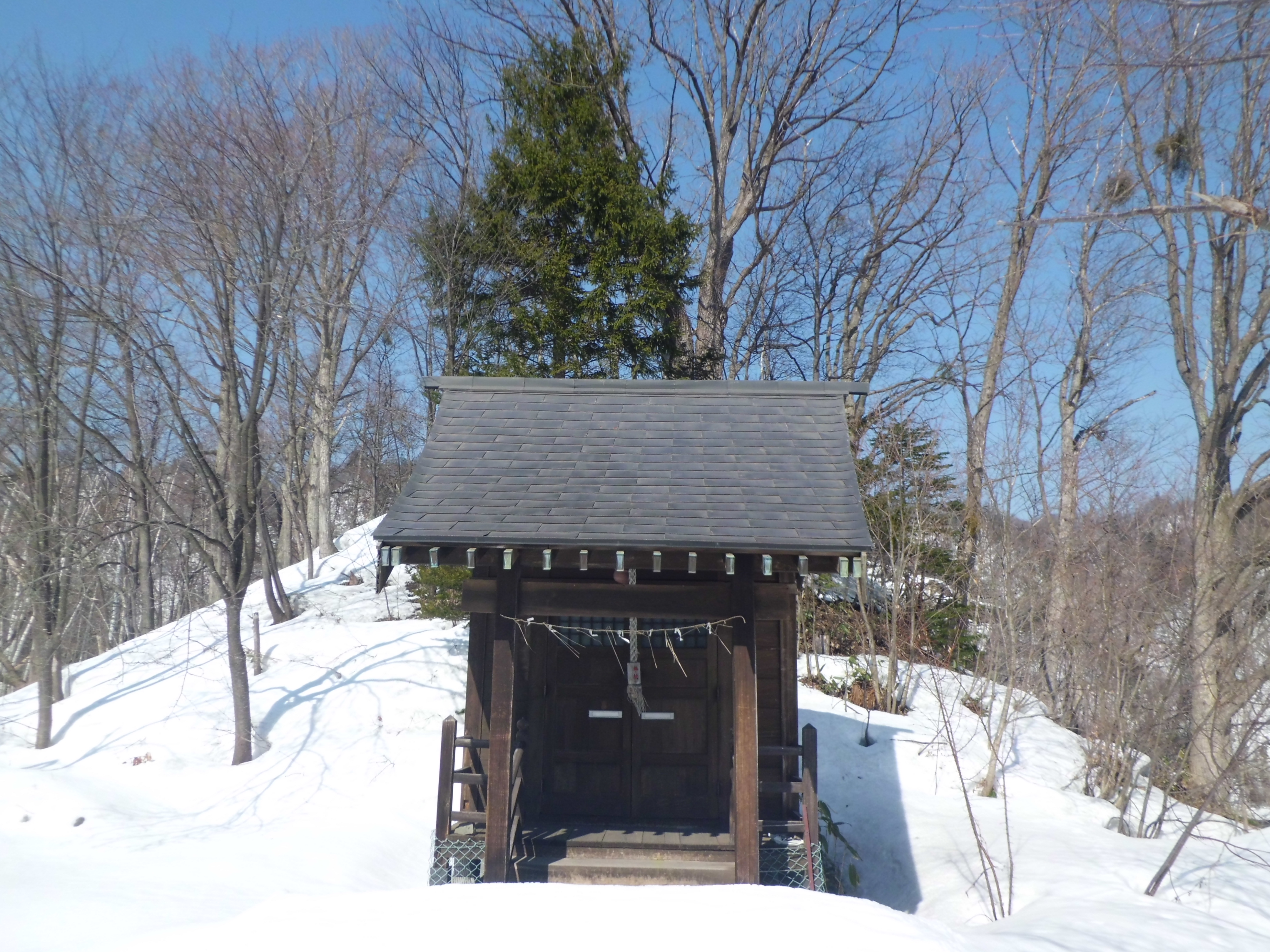 小金湯天満宮